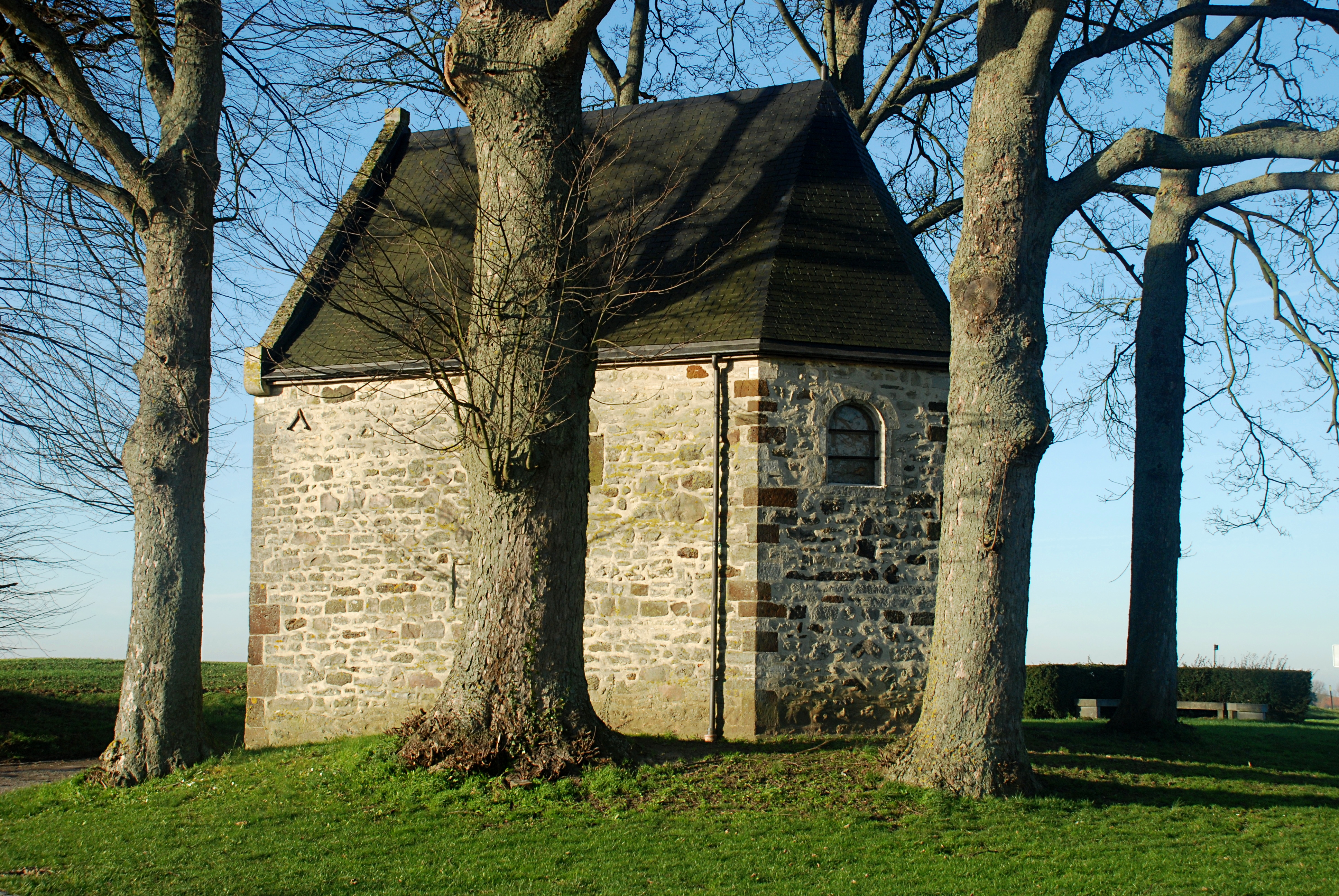 Belgique - Brabant wallon - Chaumont-Gistoux - Longueville - Chapelle du Chêneau